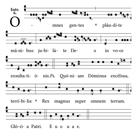 Introitus-Antiphon Omnes gentes, plaudite manibus (Psalm 47 (46))